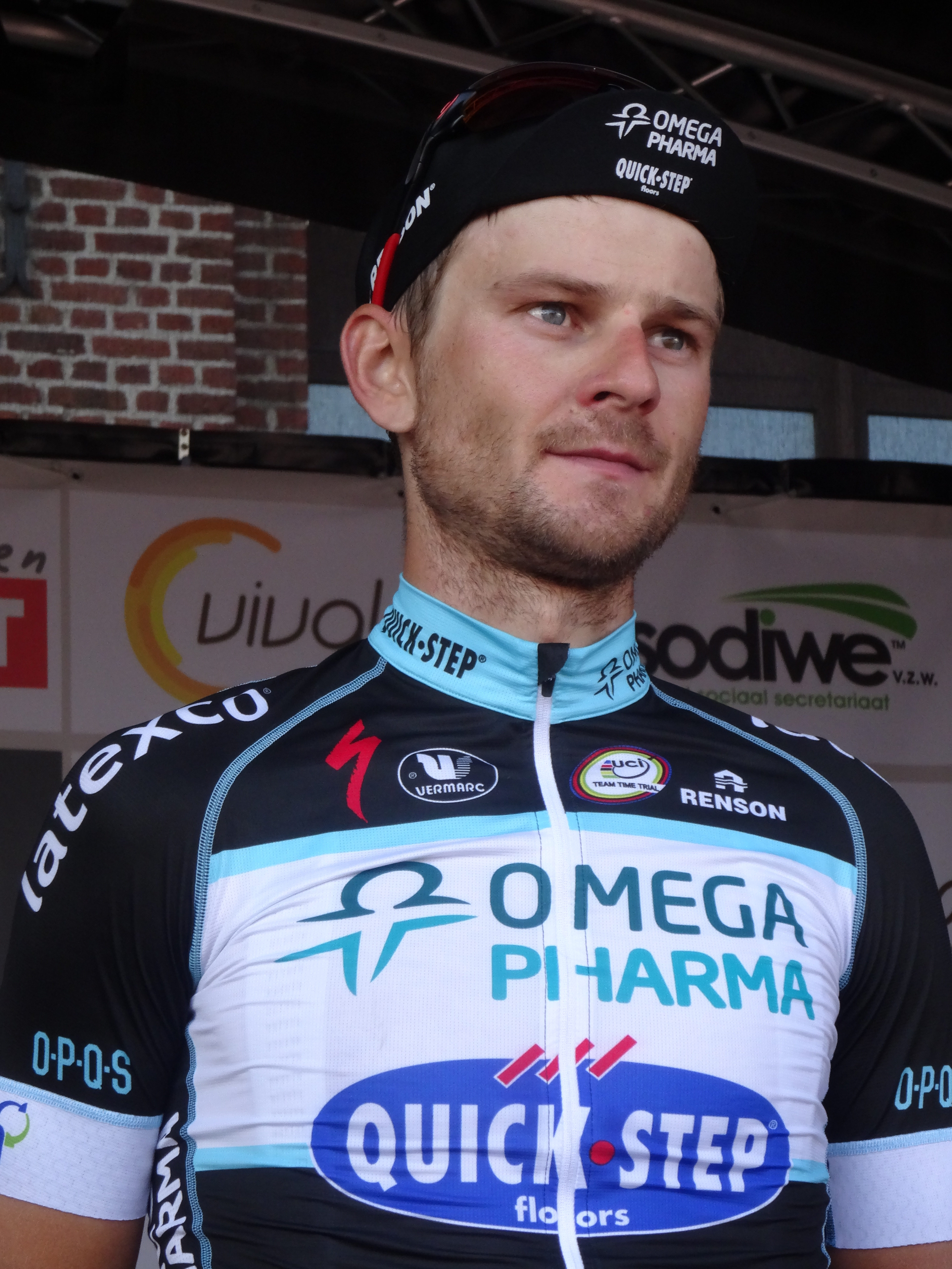 Grand Prix Impanis-Van Petegem 2014.